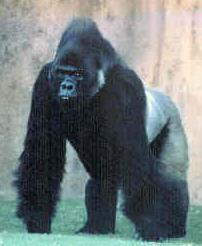 Flachlandgorilla Public Domain Bild, via englische Wikipedia übernommen von Public-Domain-Quelle